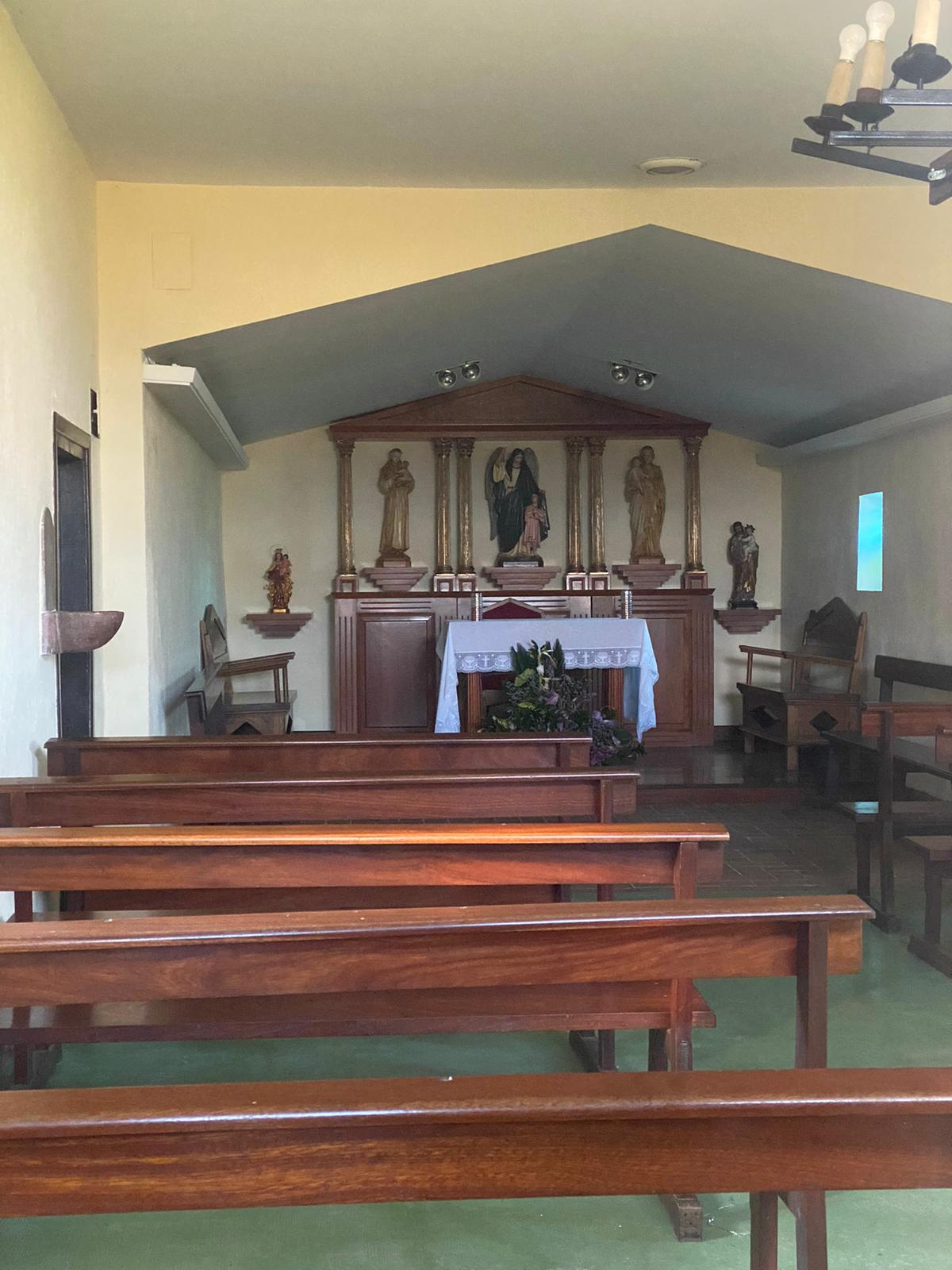 Aingeru Zaindariaren baseliza barrutik. Aldarean baselizaren patronua dago